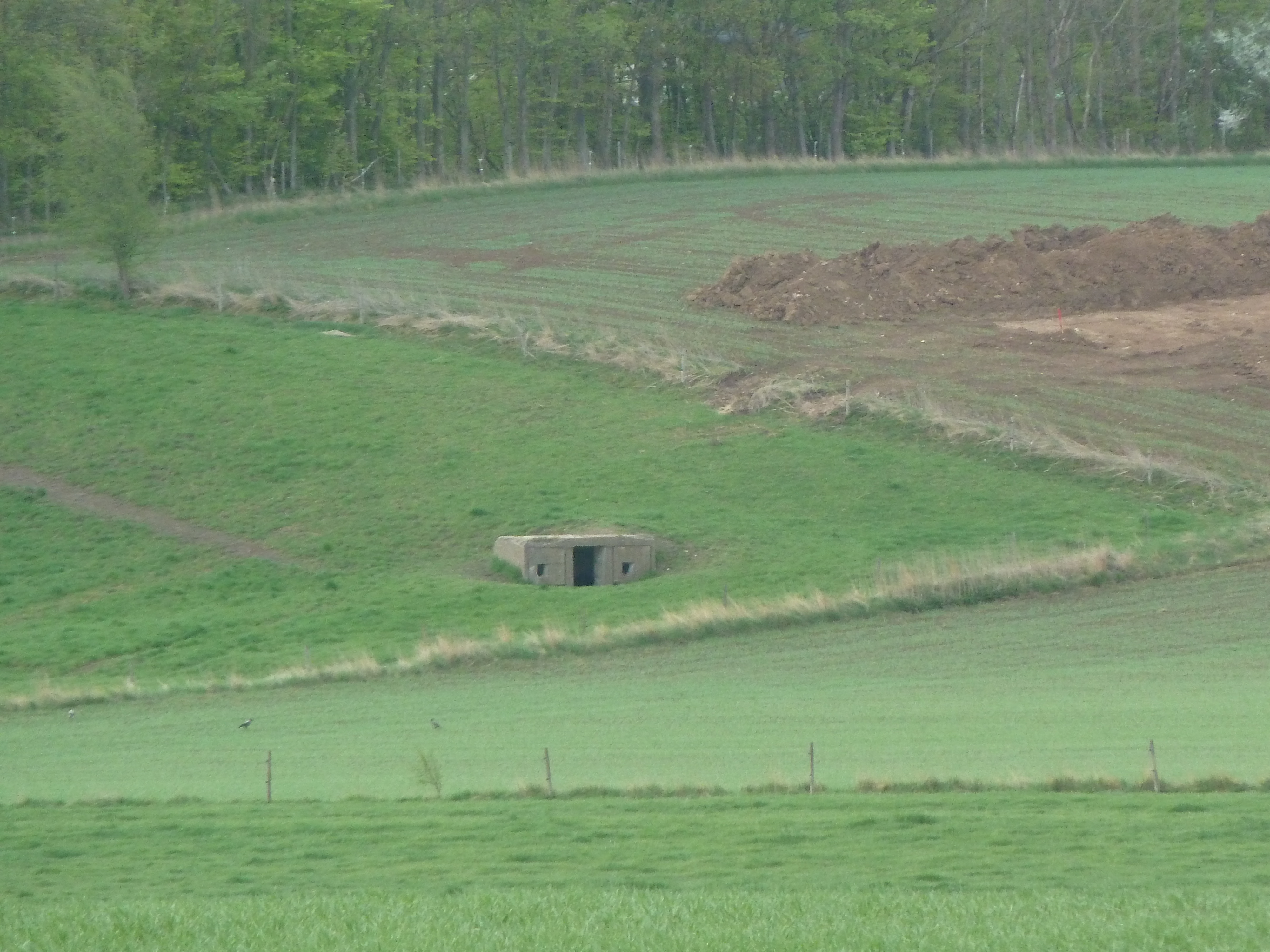 Justitsraadshule - en af Tunestillingens tilbageblevne 'bunkers' - set fra Hastrupvejen.